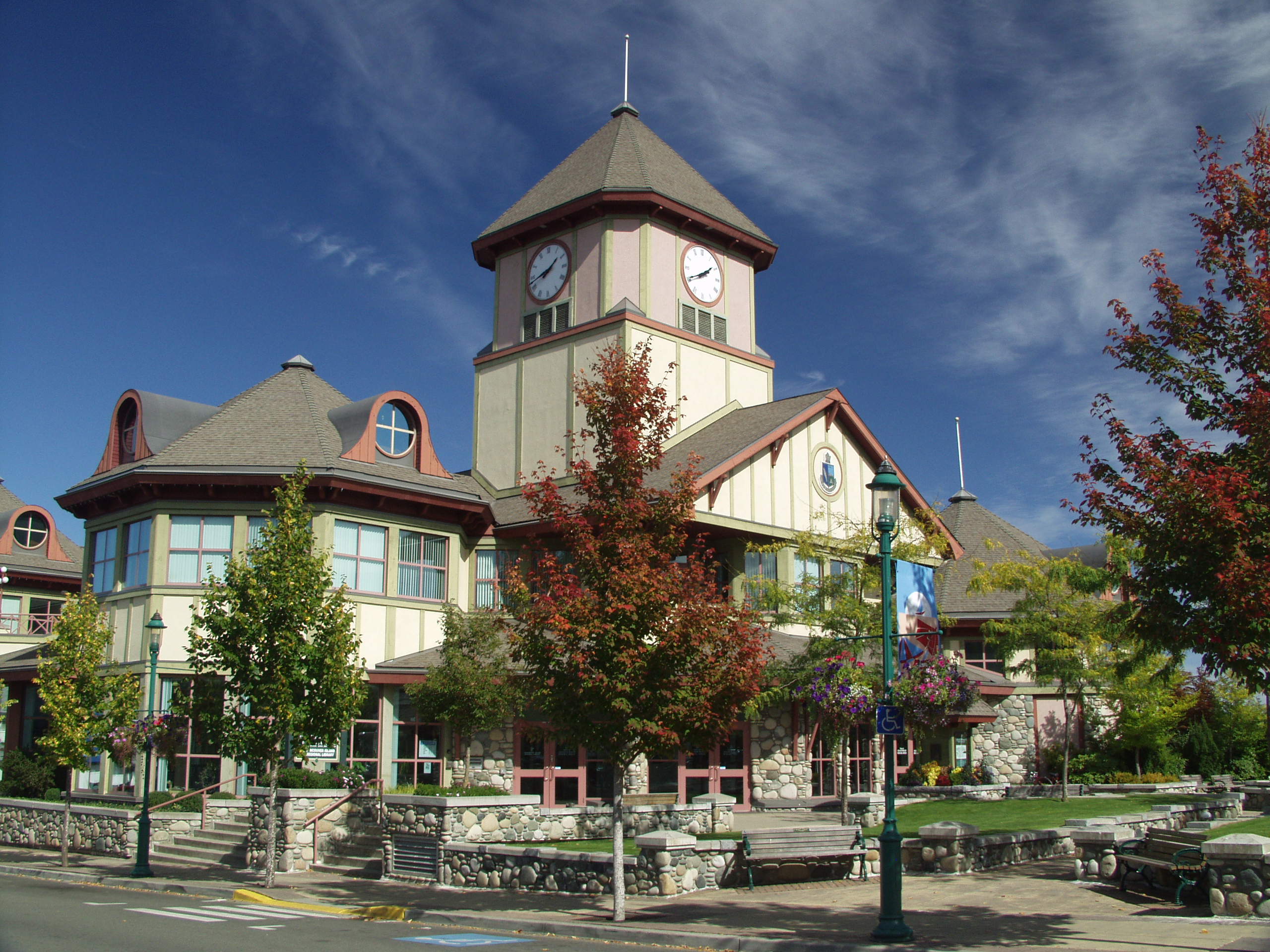 Pictures courtesy of Town of Qualicum Beach